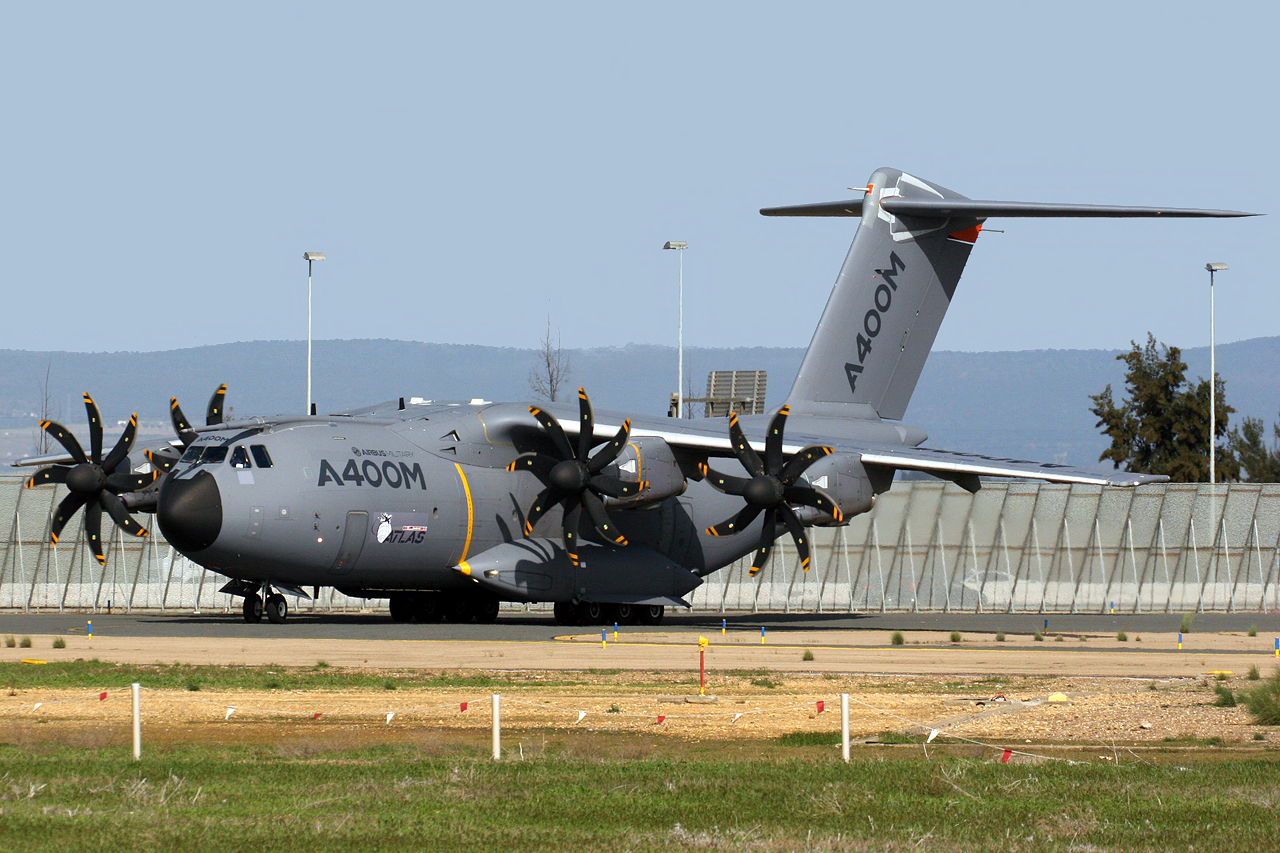 Sevilla LEZL/SVQ Airport